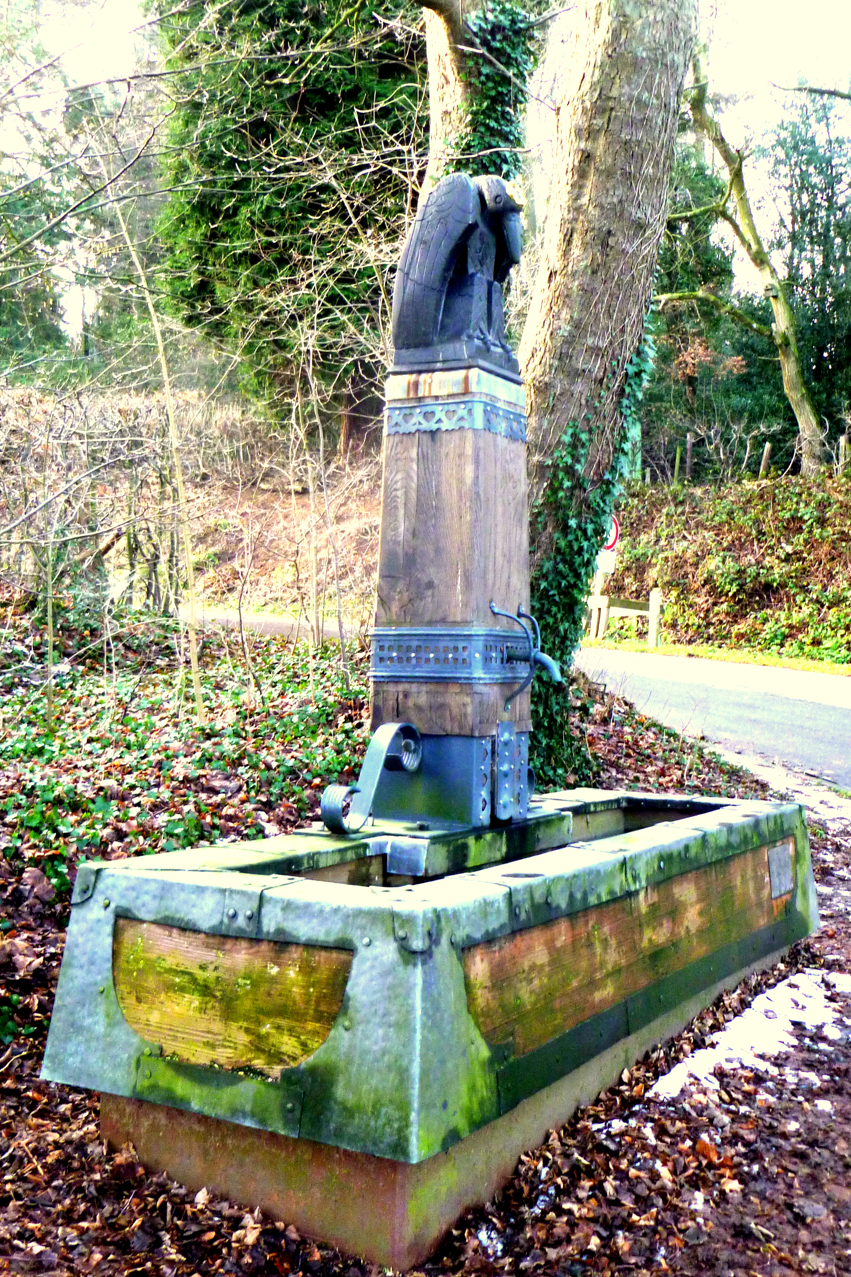 Rabenbrunnen Linzenshäuschen in Aachen, Skulptur von Matthias Corr